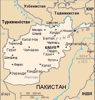 Мапа Афганістану.